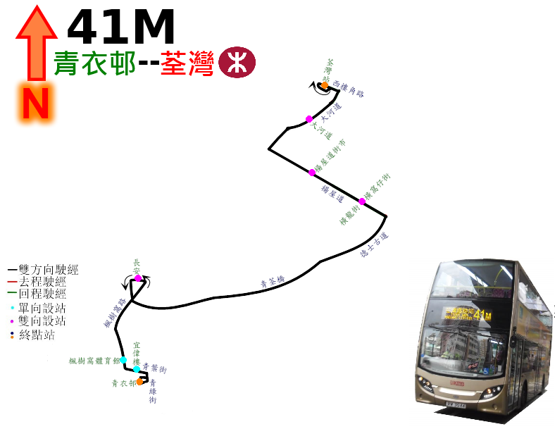 中文（香港）: 九巴41M線的走線圖